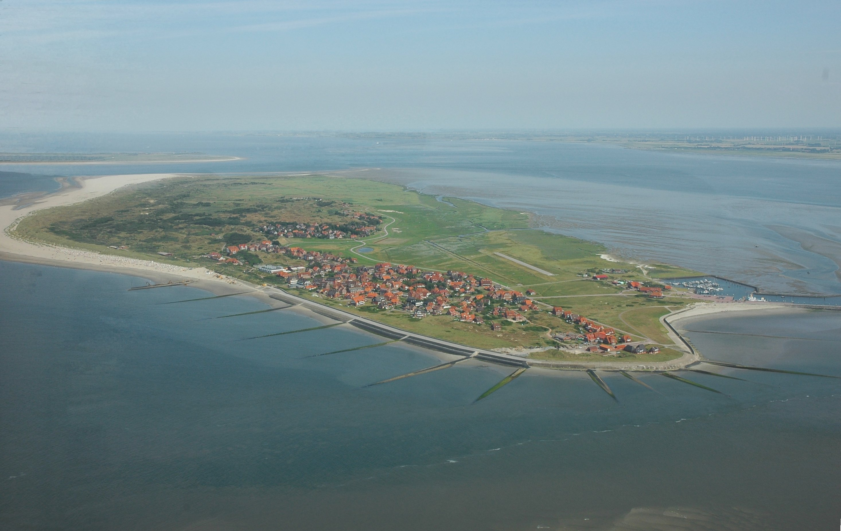 luftaufnahme Baltrum